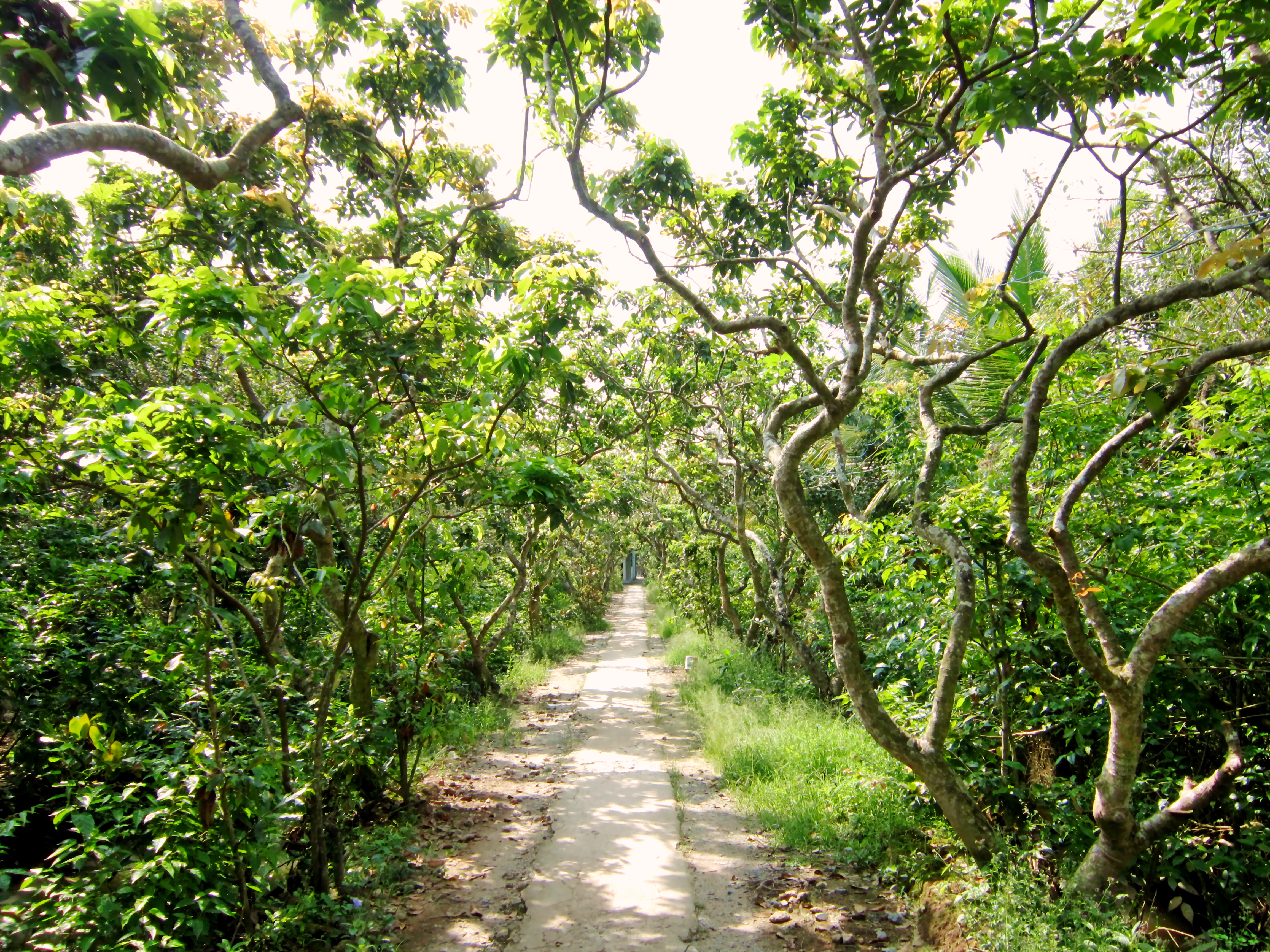 Một trong số nhiều vườn nhãn ở cồn Quy, thuộc huyện Châu Thành, tỉnh Bến Tre, Việt Nam.